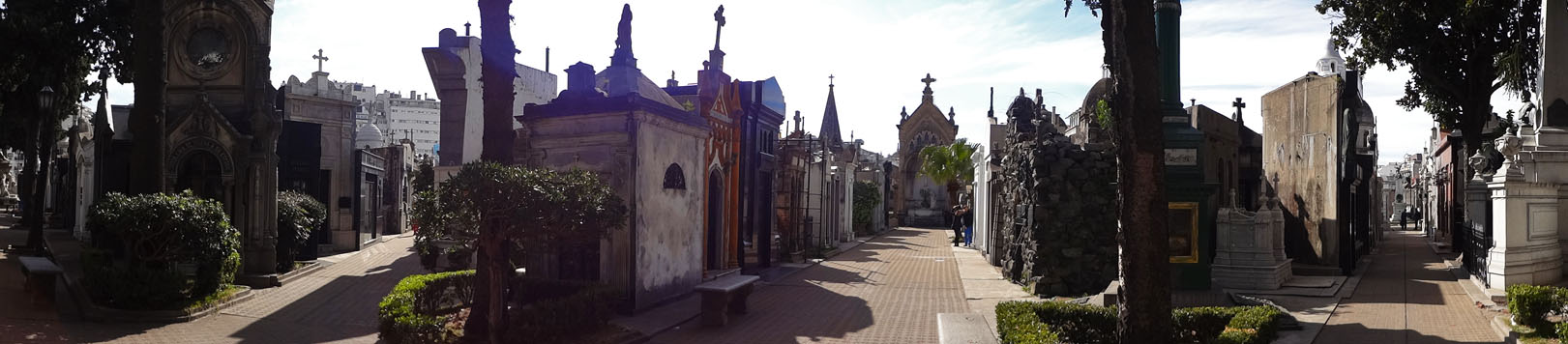 Panorama del cementerio de La Recoleta, Buenos Aires.